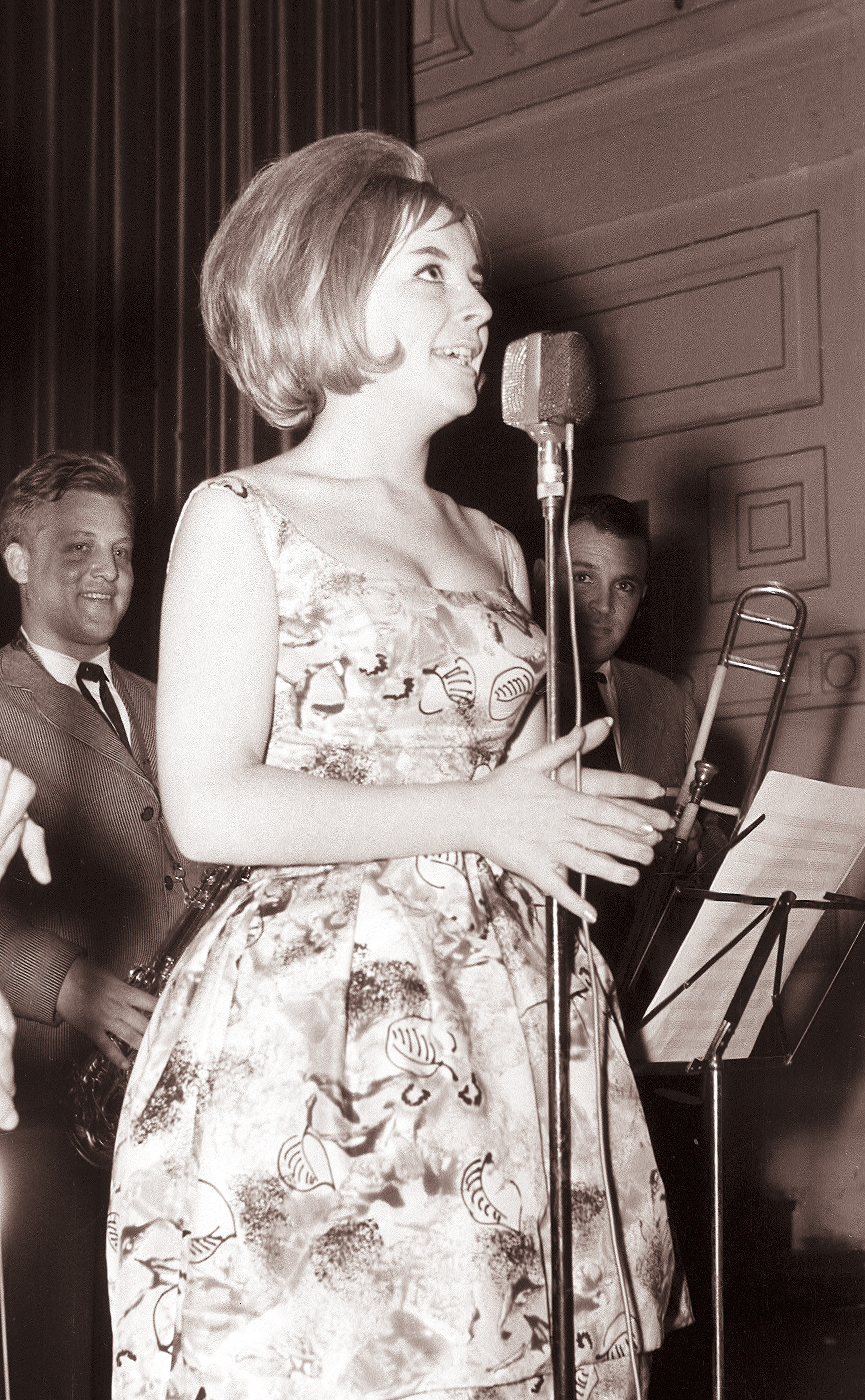 Koncert orkestra Nikice Kalodjere s pevci v Mariboru - Gabi Novak